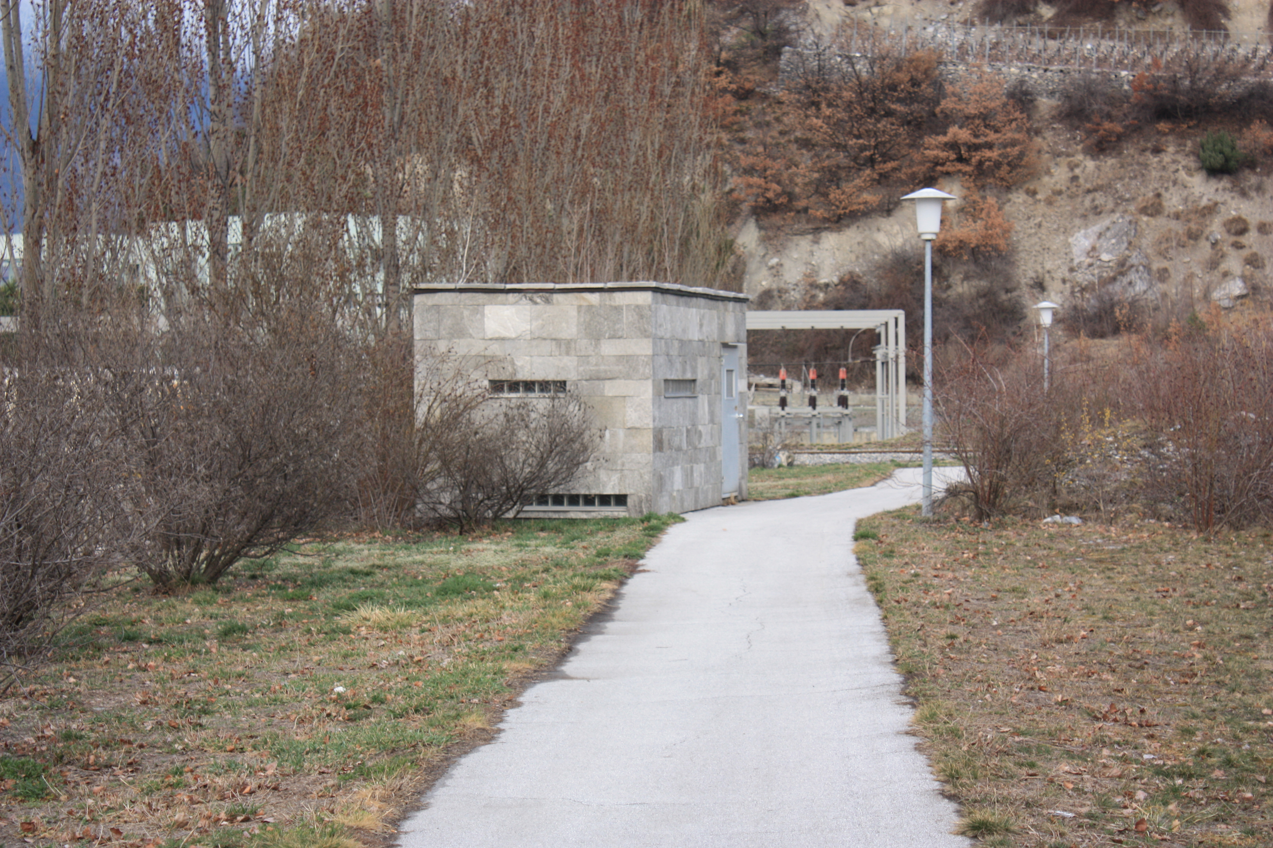 L'issue de secours qui se situe exactement au-dessus du lieu de l'accident d'autobus qui s'est produit dans le Tunnel de Sierre le 13 mars 2012